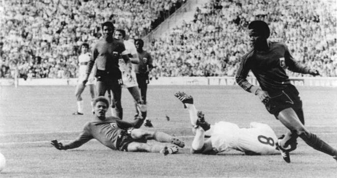 ADN-ZB-AP-Tele-15.6.74-ma-BRD-München: X. Fußball-Weltmeisterschaft-1. Finalrunde, Gruppe 4: Italien - Haiti 3:1- Diesen Angriff der Italiener kann der zu Fall kommende Fabio Capello (Nr.8) nicht erfolgreich abschließen. Verteidiger Arsene Auguste (rechts) klärt. Links am Boden Ernst Jean Joseph (beide Haiti).